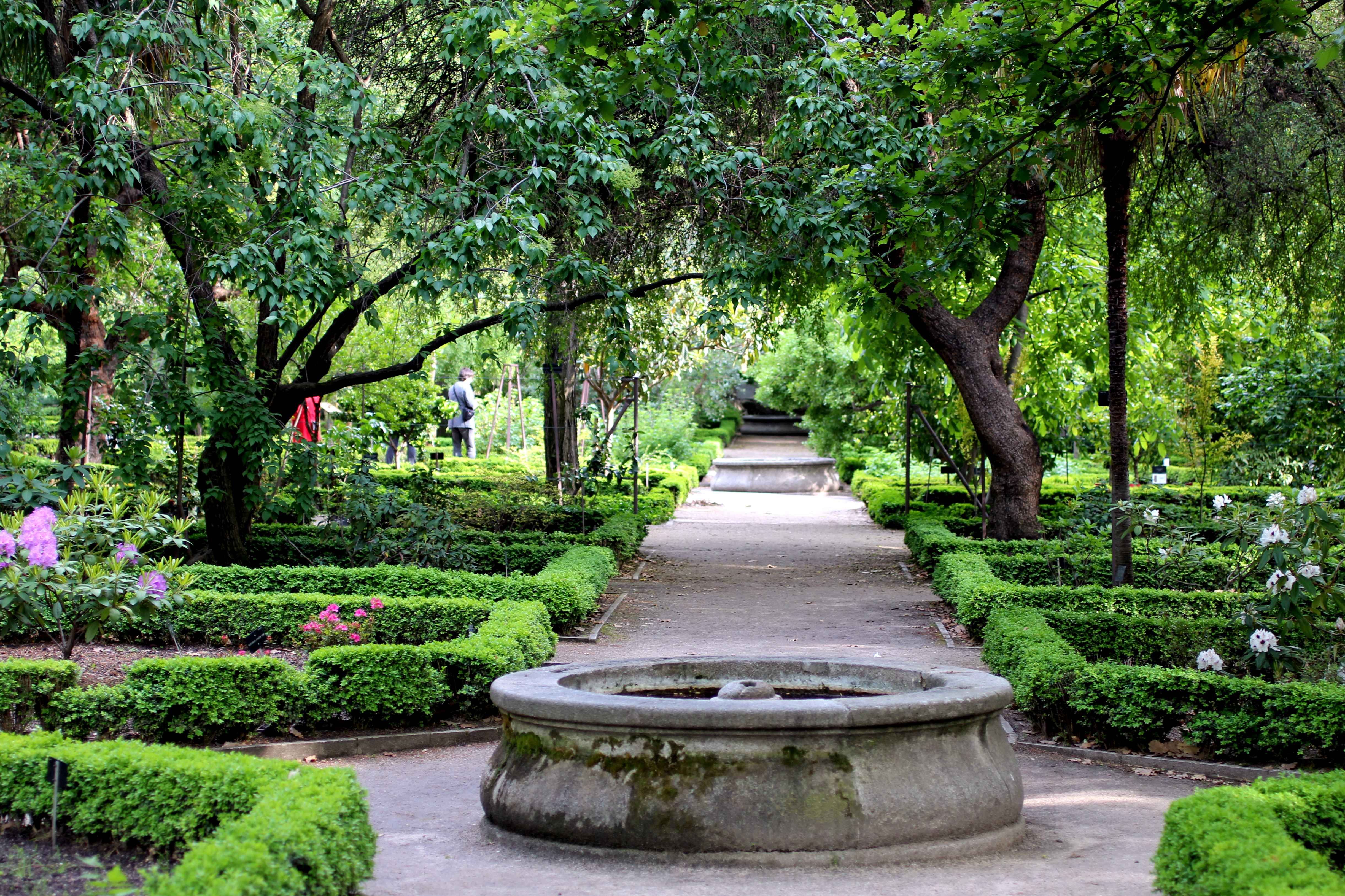 paseo con fontín